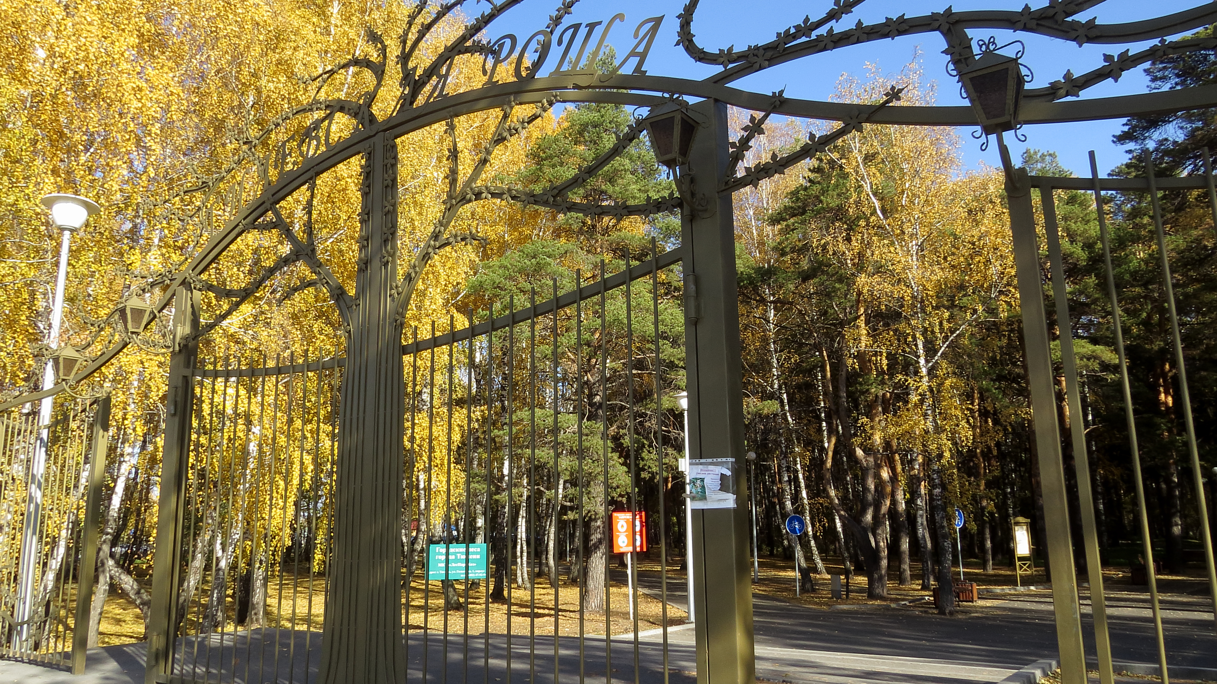 Гилевская роща: Тюмень, Тюменская область This image is related to the protected area of Russia number 7230137